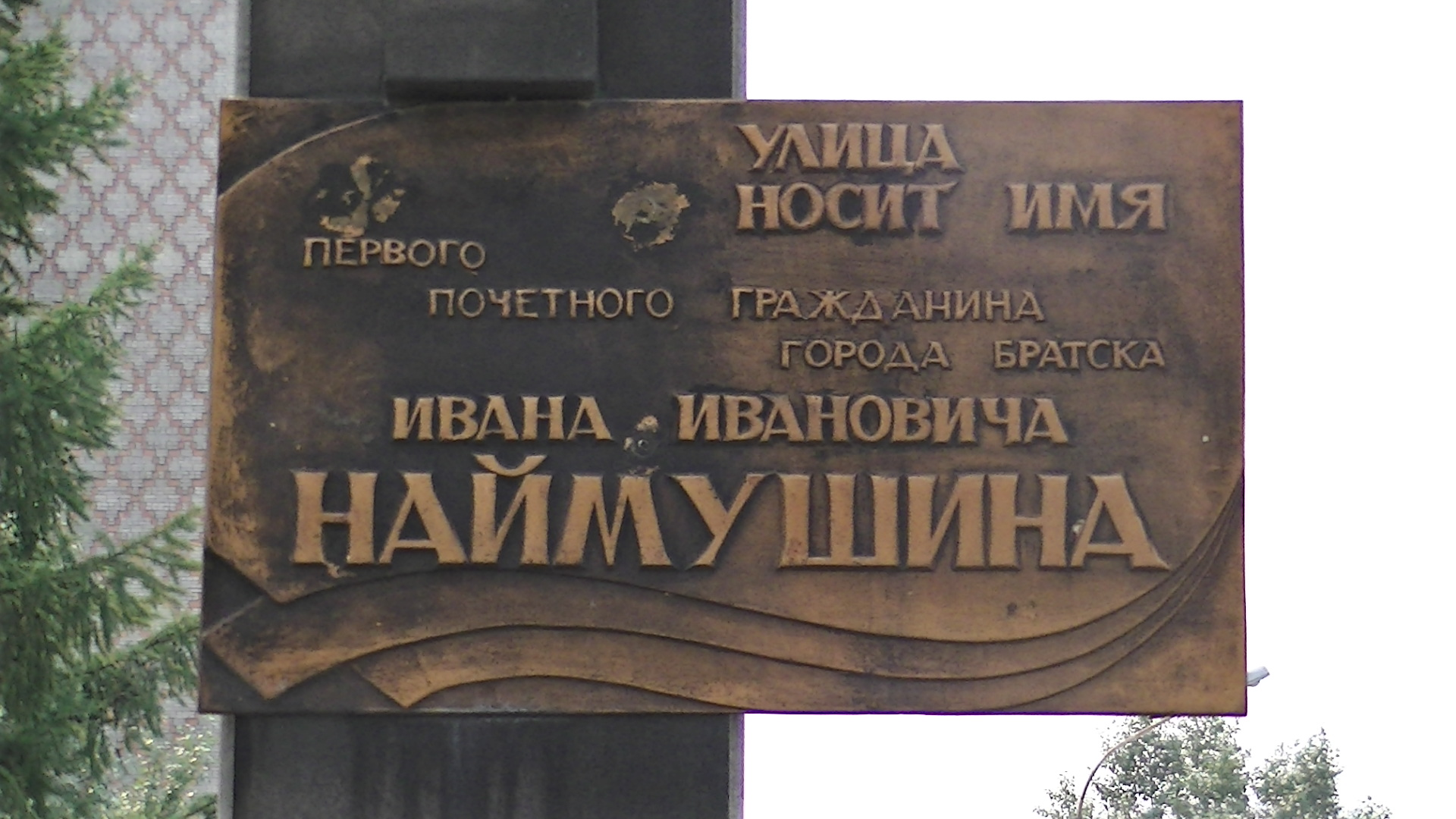 Стела и мемориальная доска на улице, носящей имя Ивана Ивановича Наймушина: улица Наймушина, Братск, Иркутская область